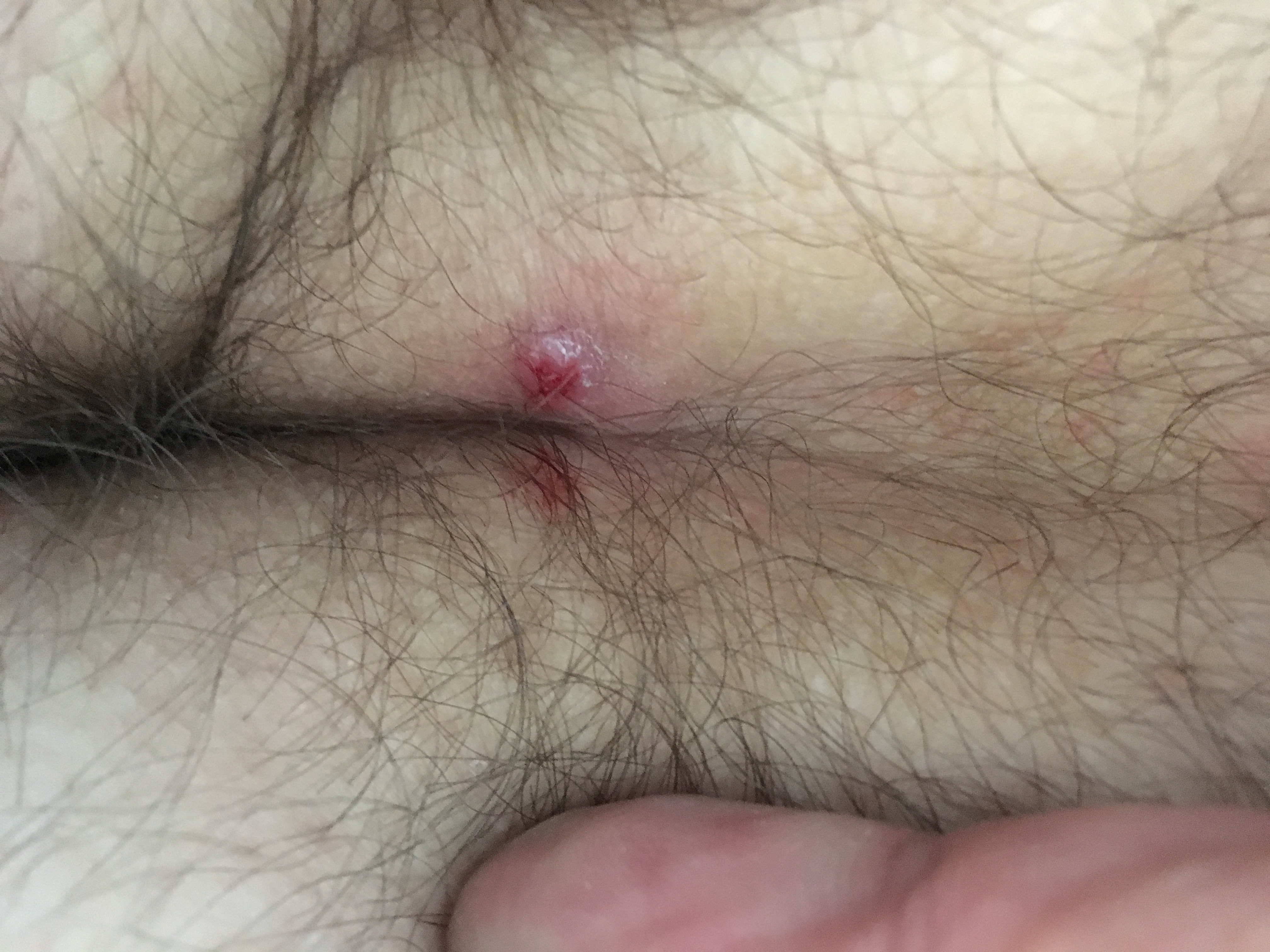 Τριχοφωλεακό συρίγγιο με κοκκιωματώδη ιστό